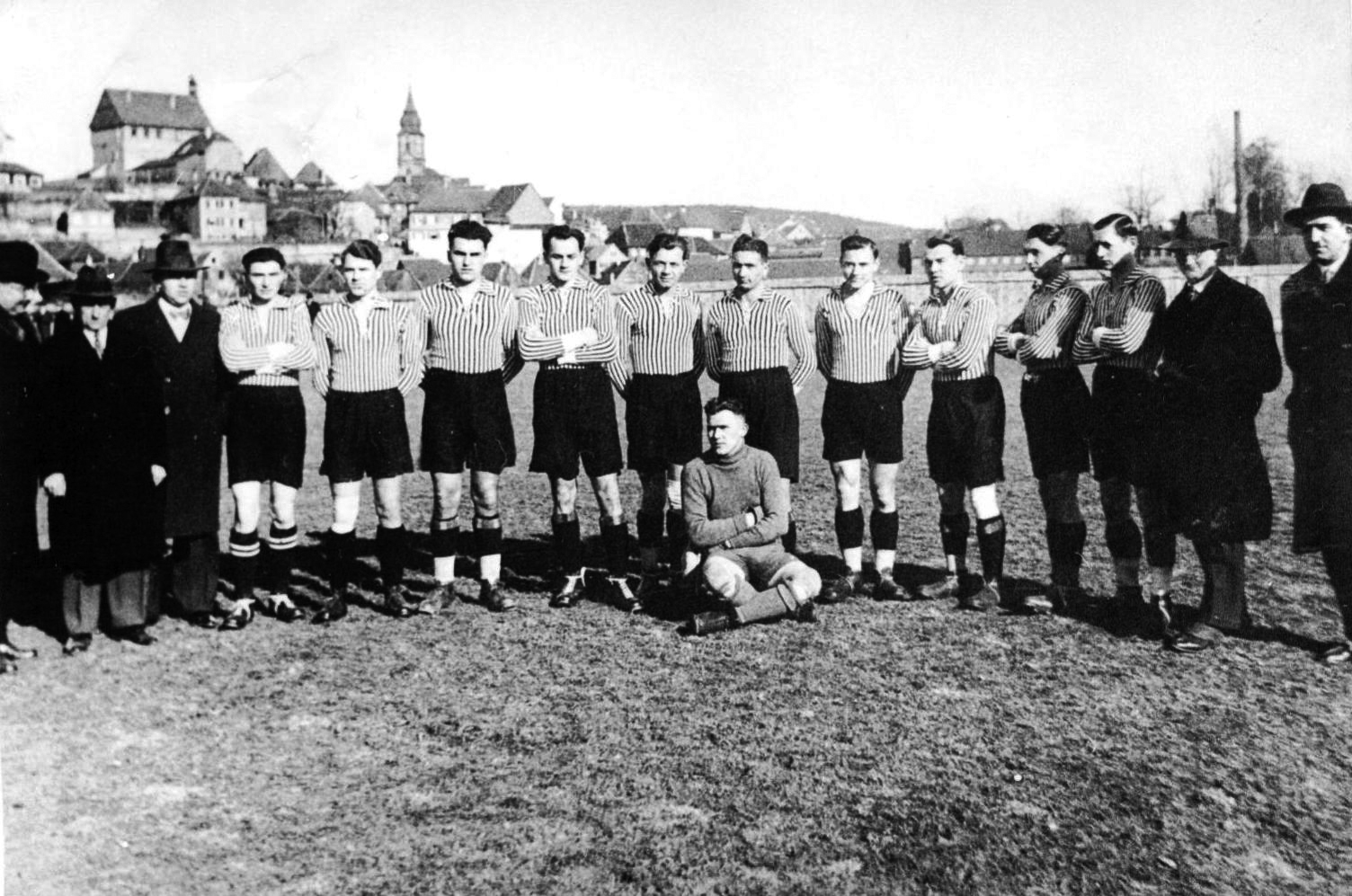 Mannschaftsfoto der Burgkunstadter "Wundermannschaft" des 1. FCB